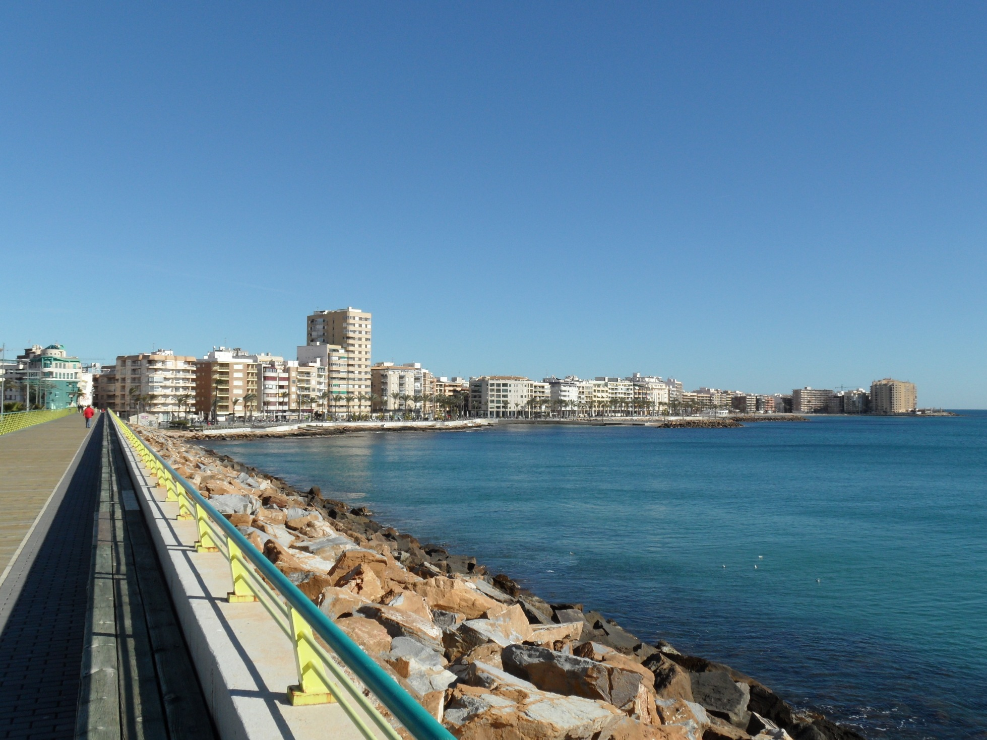 Torrevieja vista desde el dique de Levante.